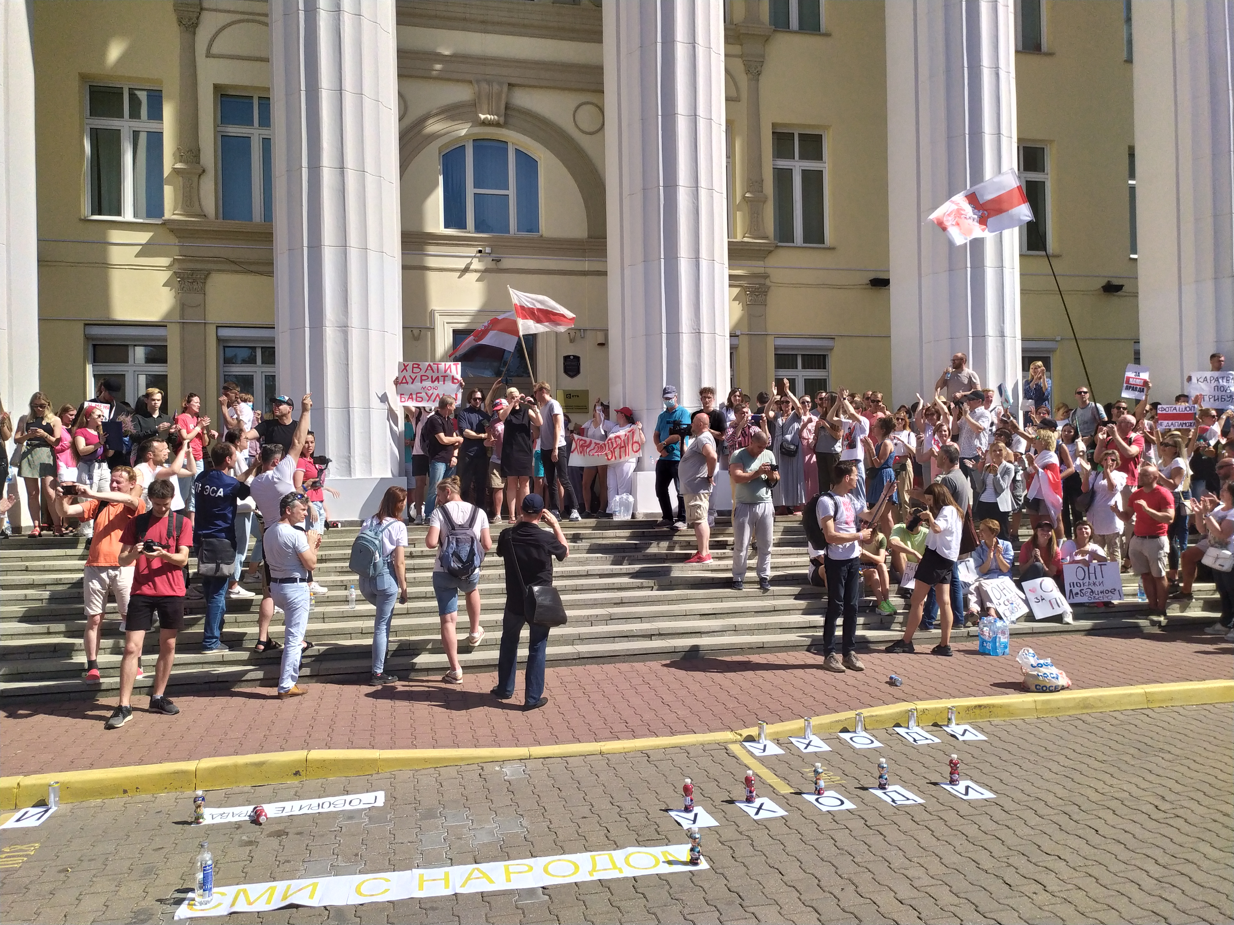 Митинг в поддержку протестов журналистов и работников телеканалов ОНТ и СТВ